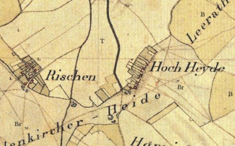 Kartenaufnahme der Rheinlande 1803-1820